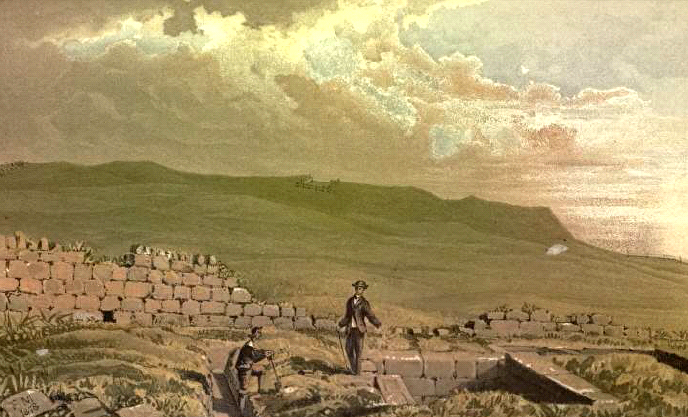 Untersuchung von "Coventinas Well" beim römischen Kastell Carrawburgh/Brocolitia durch John Clayton im Jahre 1876, Zeichnung von 1878.